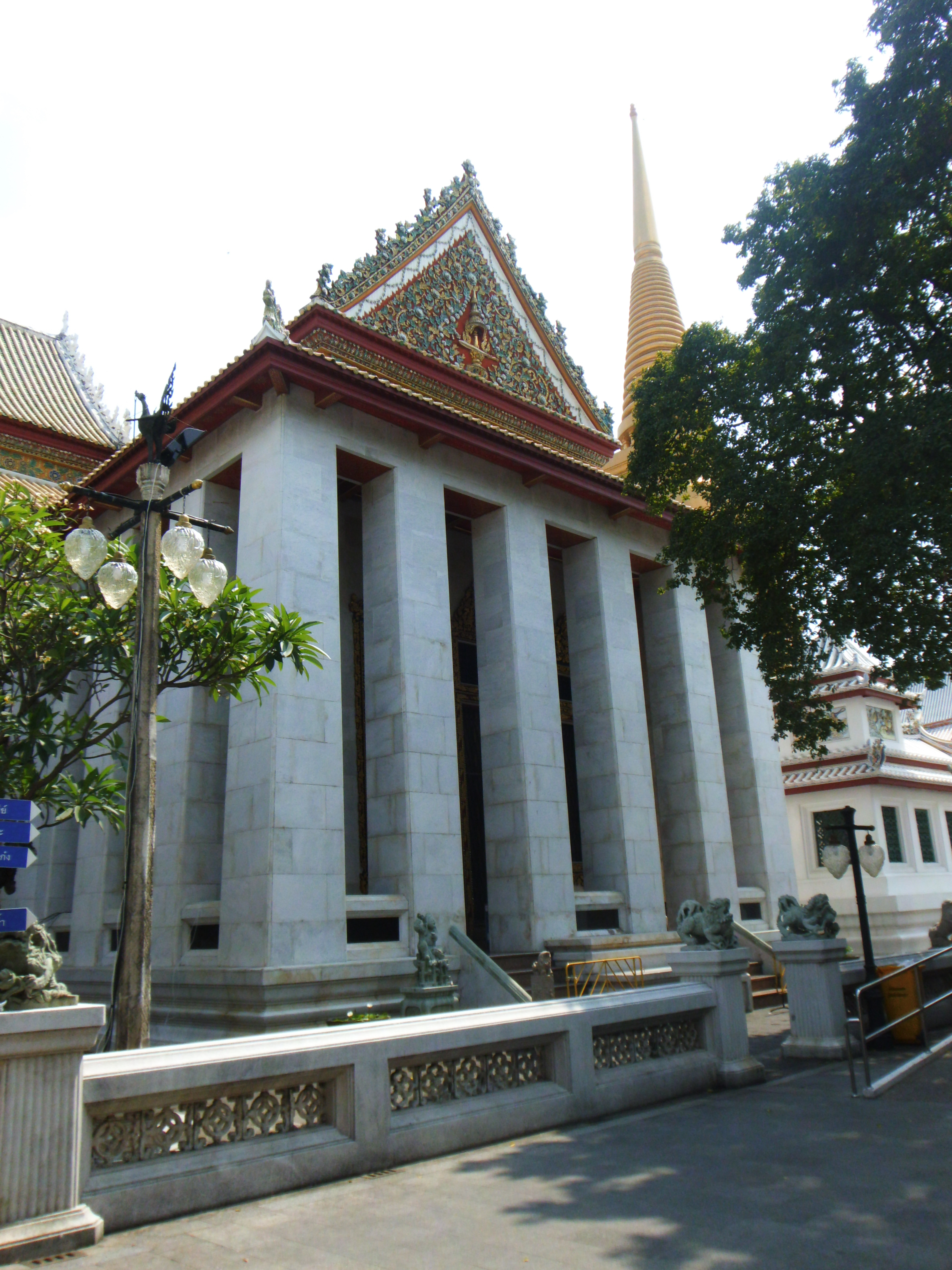 วัดบวรนิเวศวิหาร